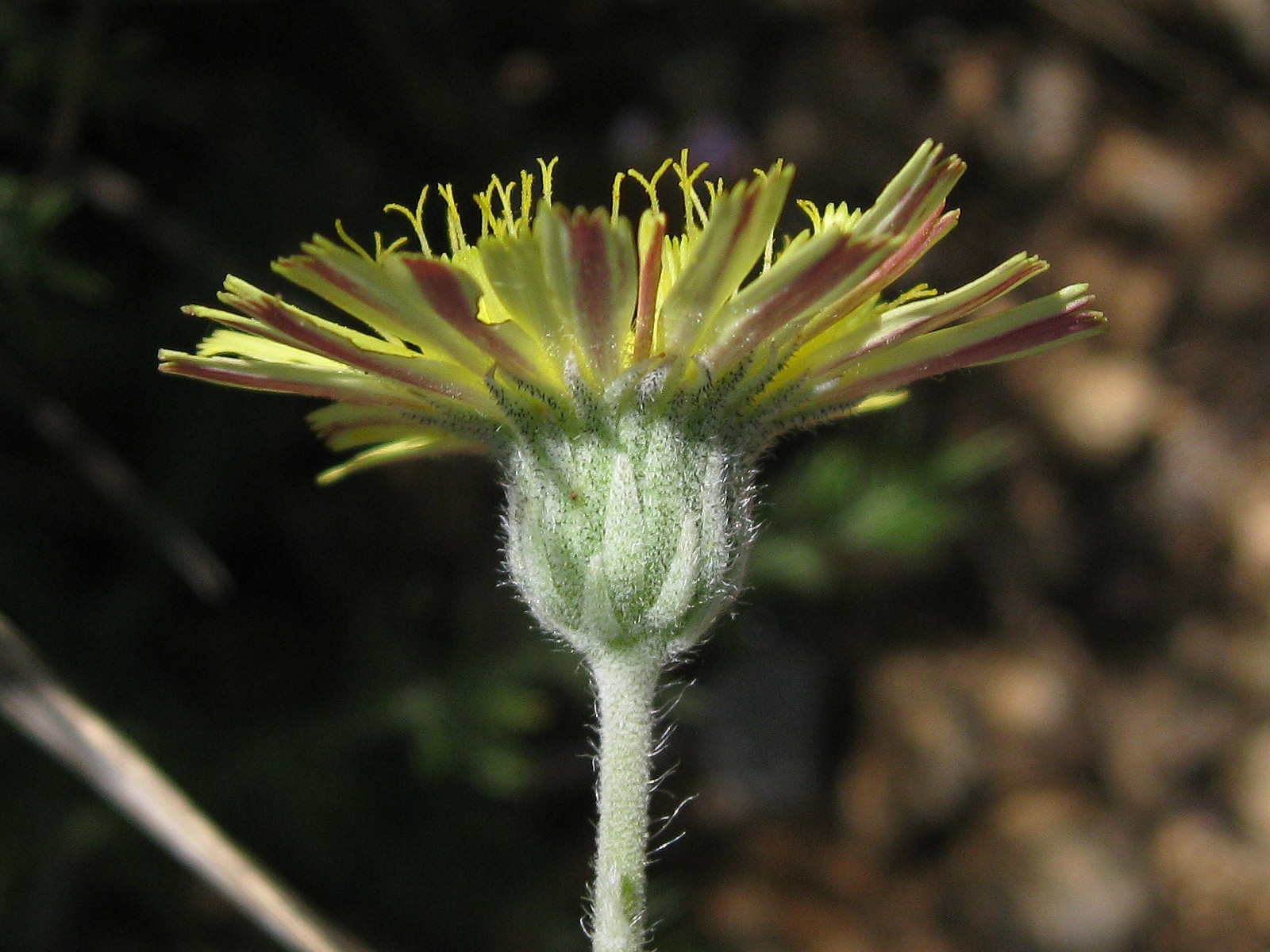 Bràctees involucrals i part superior del peduncle de Hieracium tardans Peter.